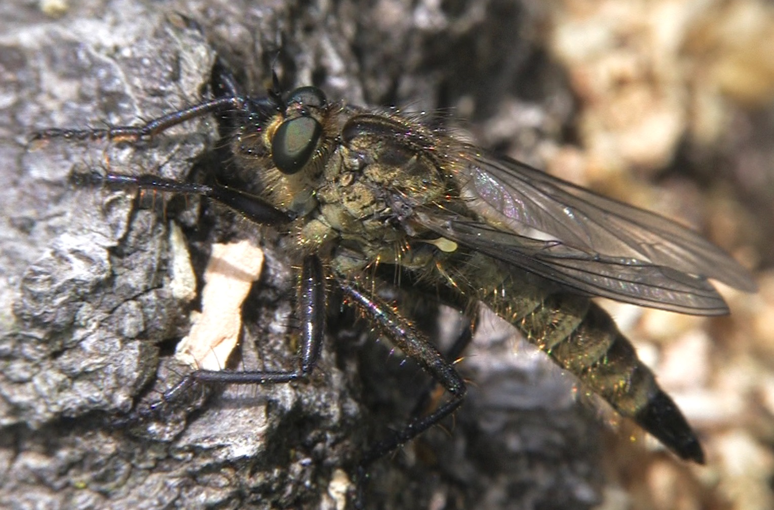 Didysmachus picipes, Weibchen, gefunden am Waldrand des Brücker Waldes, Amöneburger Becken, Mittelhessen.